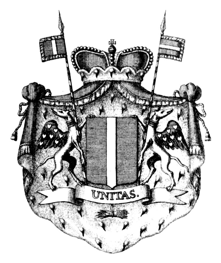 Wappen der Fürsten von der Leyen